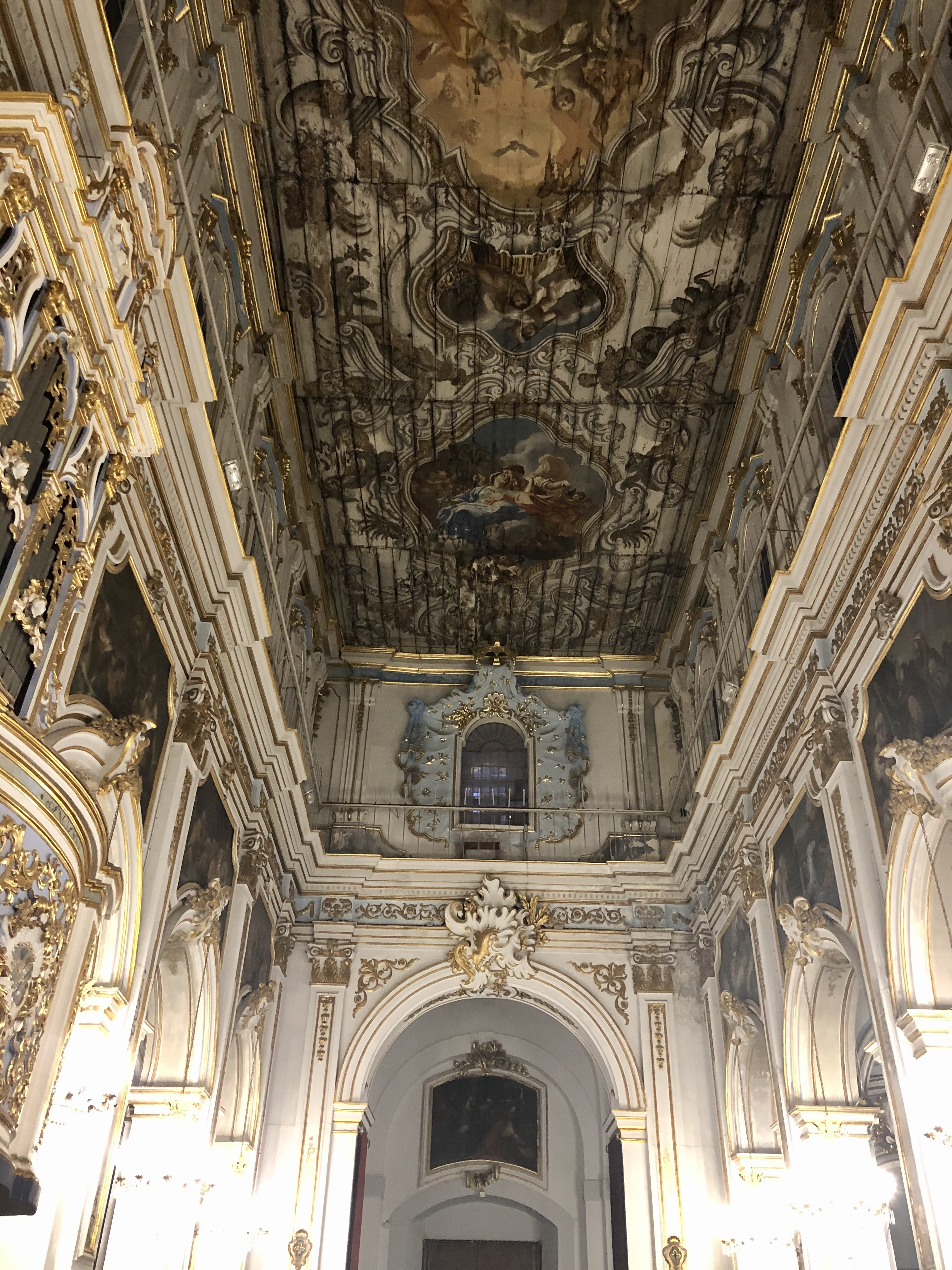 Interni basilica San Sebastiano, Melilli